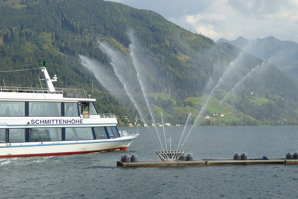 Schifffahrt Zell am See